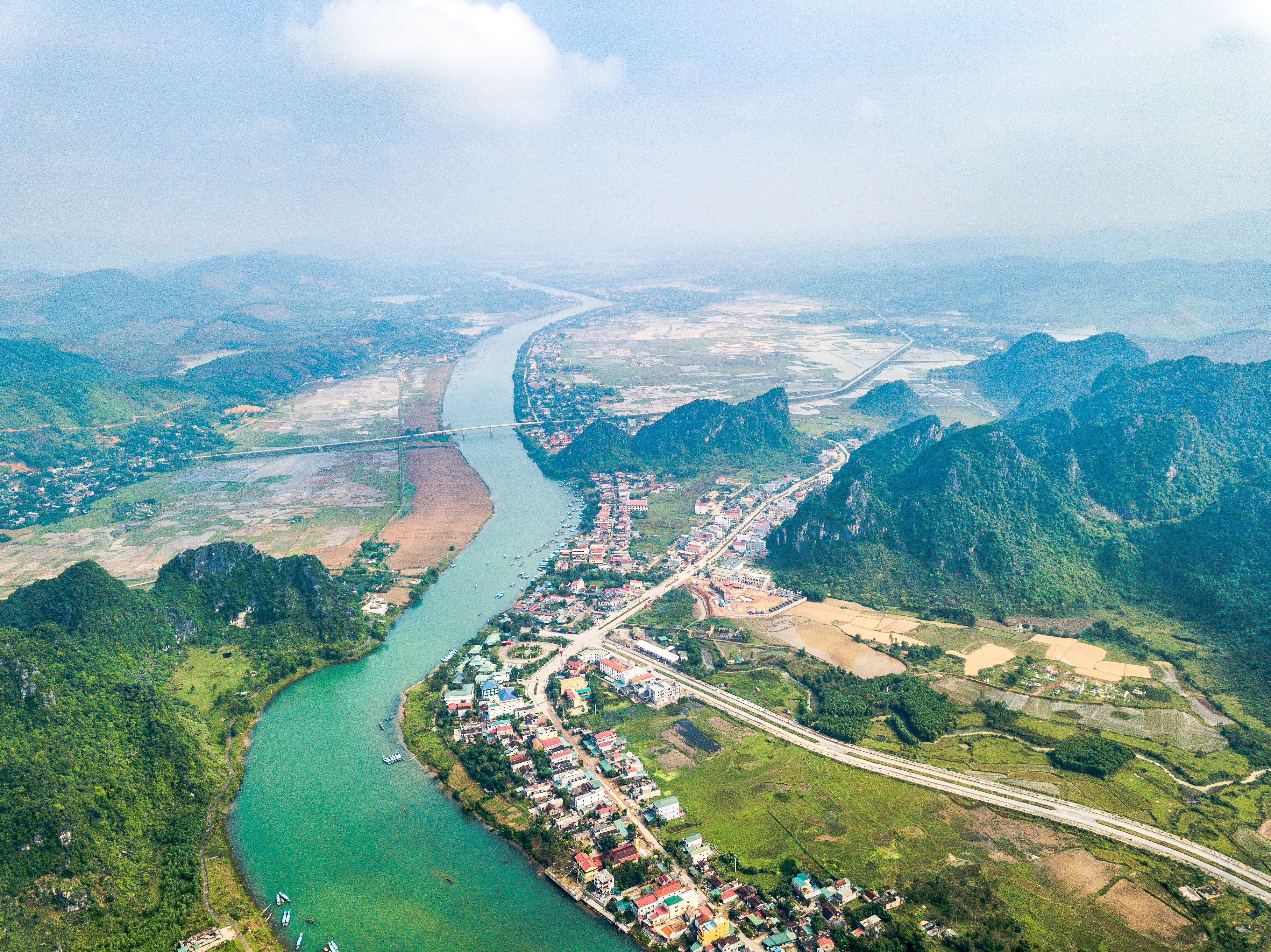 Les grottes du parc de Phong Nha-Ke Bang